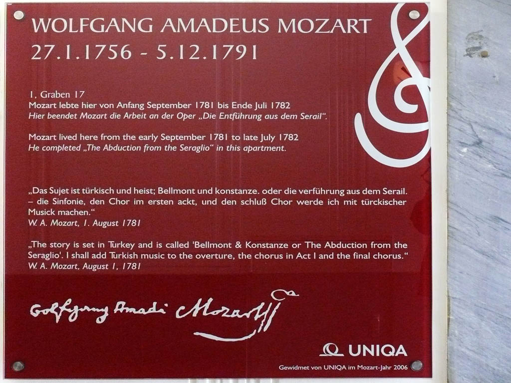 Graben 17. Mozart Gedenktafel